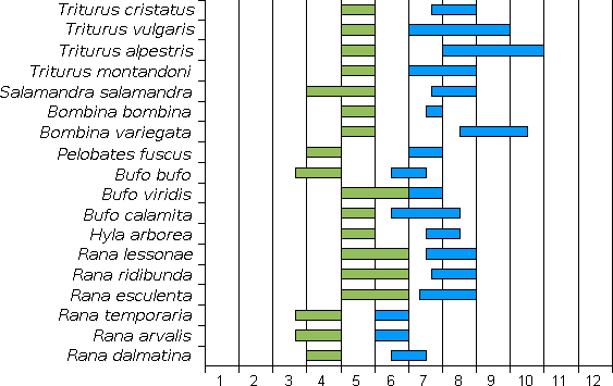 Wykres pokazuje okresy w których polskie płazy zwykle składają skrzek, oraz kiedy następuje przeobrażenie kijanek (Kolorem zielonym oznaczono okres, w którym dany gatunek zwykle składa skrzek (w przypadku salamandry plamistej – rodzi larwy); niebieskim okres, w którym można spodziewać się przeobrażenia). Dane na podstawie książki Leszka Bergera „Płazy i gady Polski - Klucz do oznaczania”, Wydawnictwo Naukowe PWN, Warszawa-Poznań 2000, ISBN 83-01-13139-X